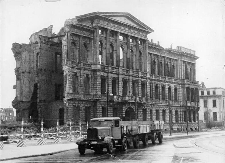 Berlin, Friedrich-Ebert-Straße, Ruine Zentralbild Junge 20.3.1957 Ehemalige Botschaft der USA, Berlin Blick auf die Ruine der ehemaligen Botschaft der USA in Berlin, Pariser Platz 2 Ecke Friedrich-Ebert-Straße 21. (Aufgenommen am 18. März 1957)